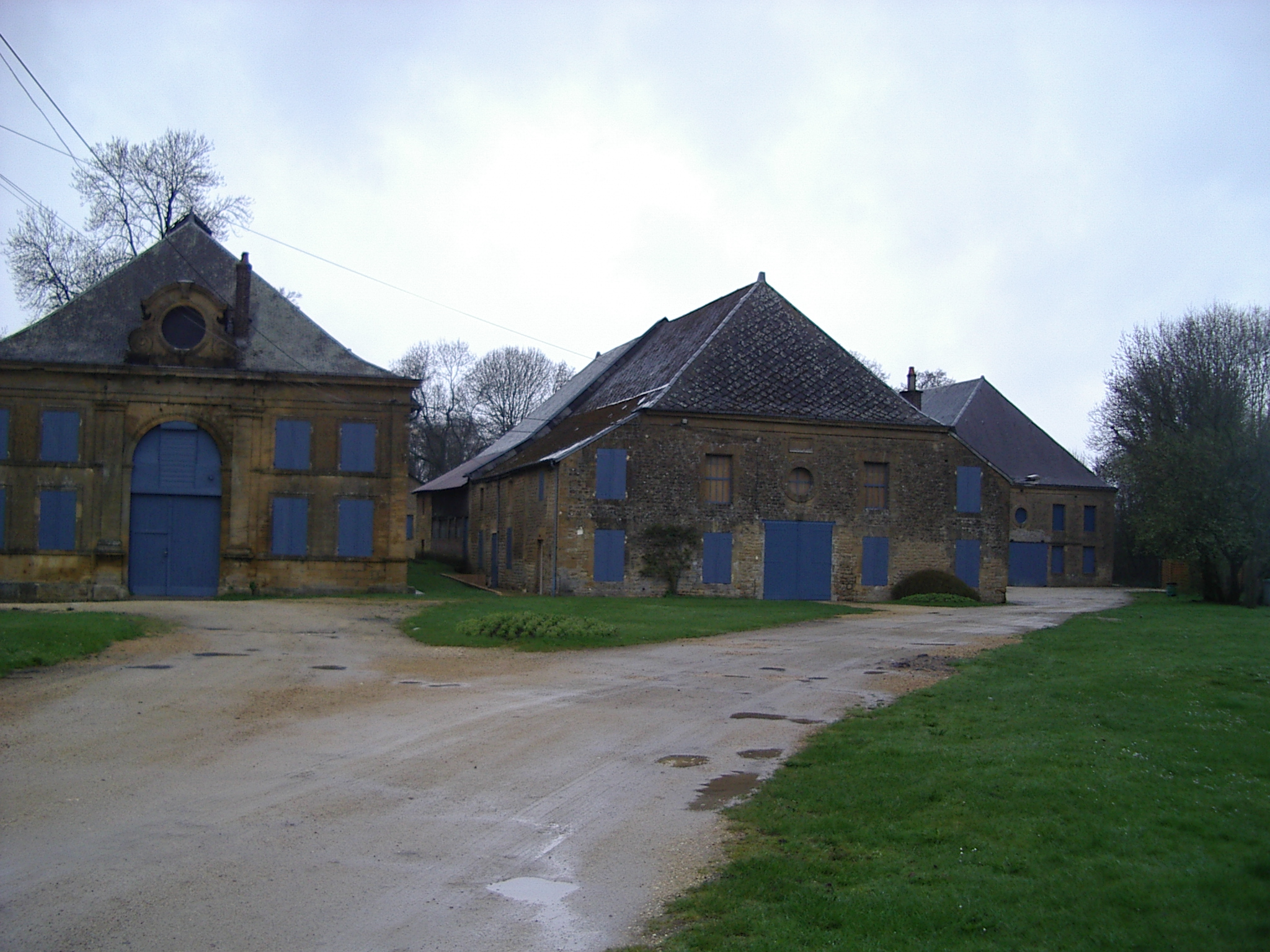 Forge Gendarme-Vrigne-aux-Bois- Ardennes-France